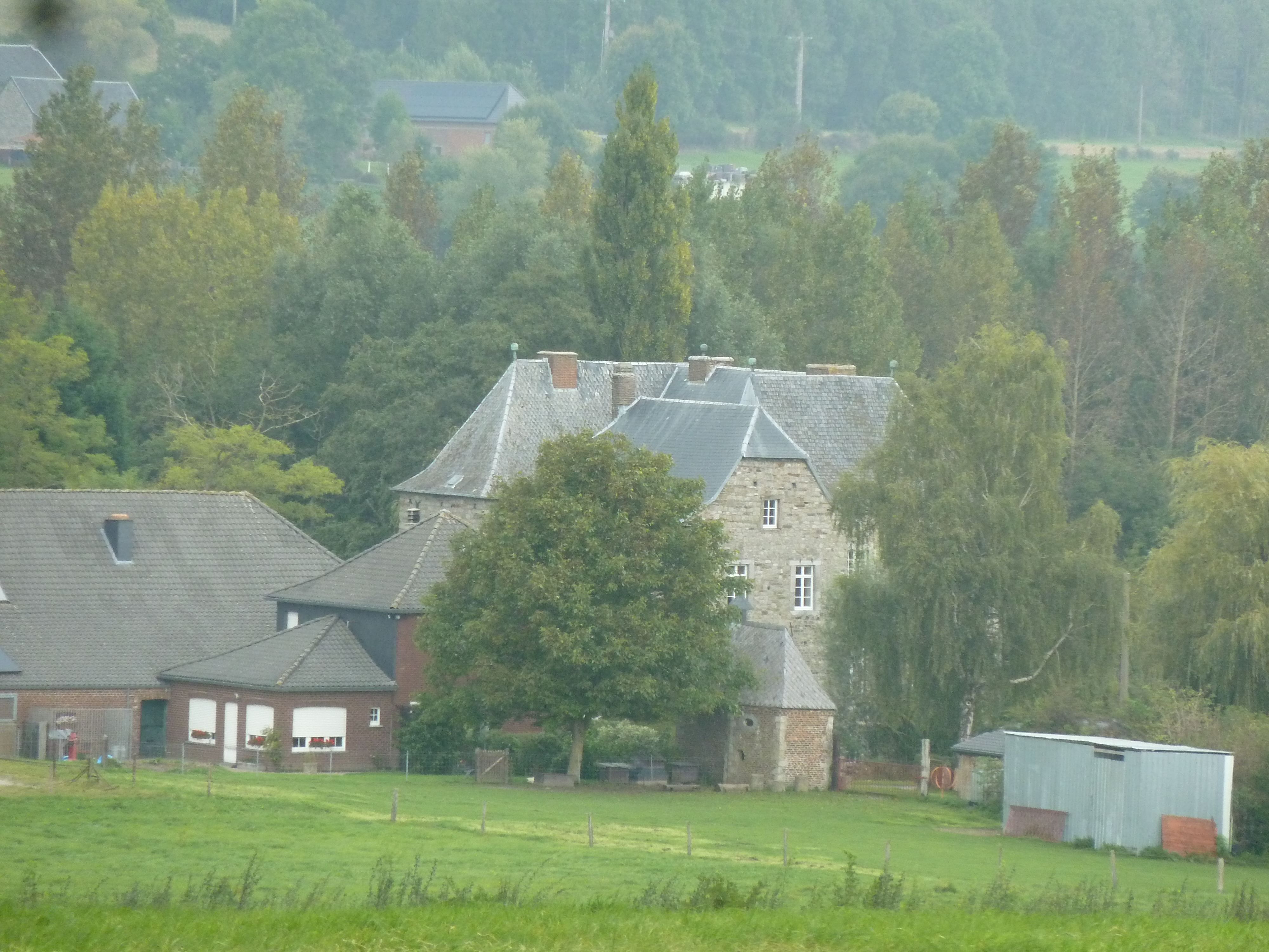 Kasteel Broich, Montzen, Plombières, België